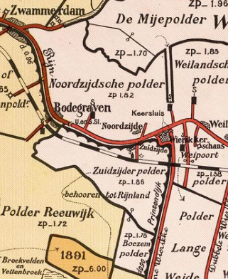 uidzijderpolder